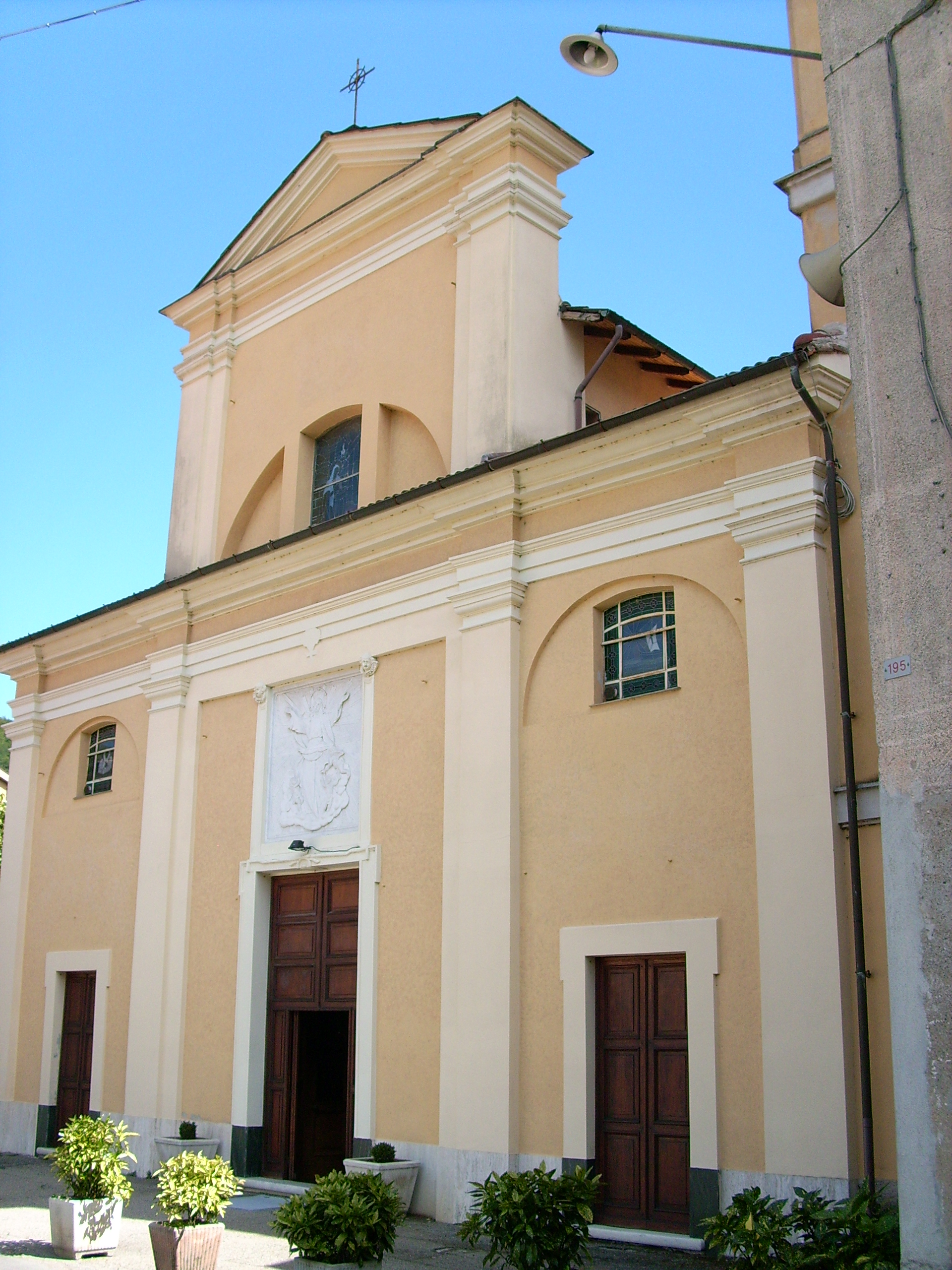 Pieve di santa Maria presso Borgo Fornari (Ronco Scrivia), Liguria, Italia.